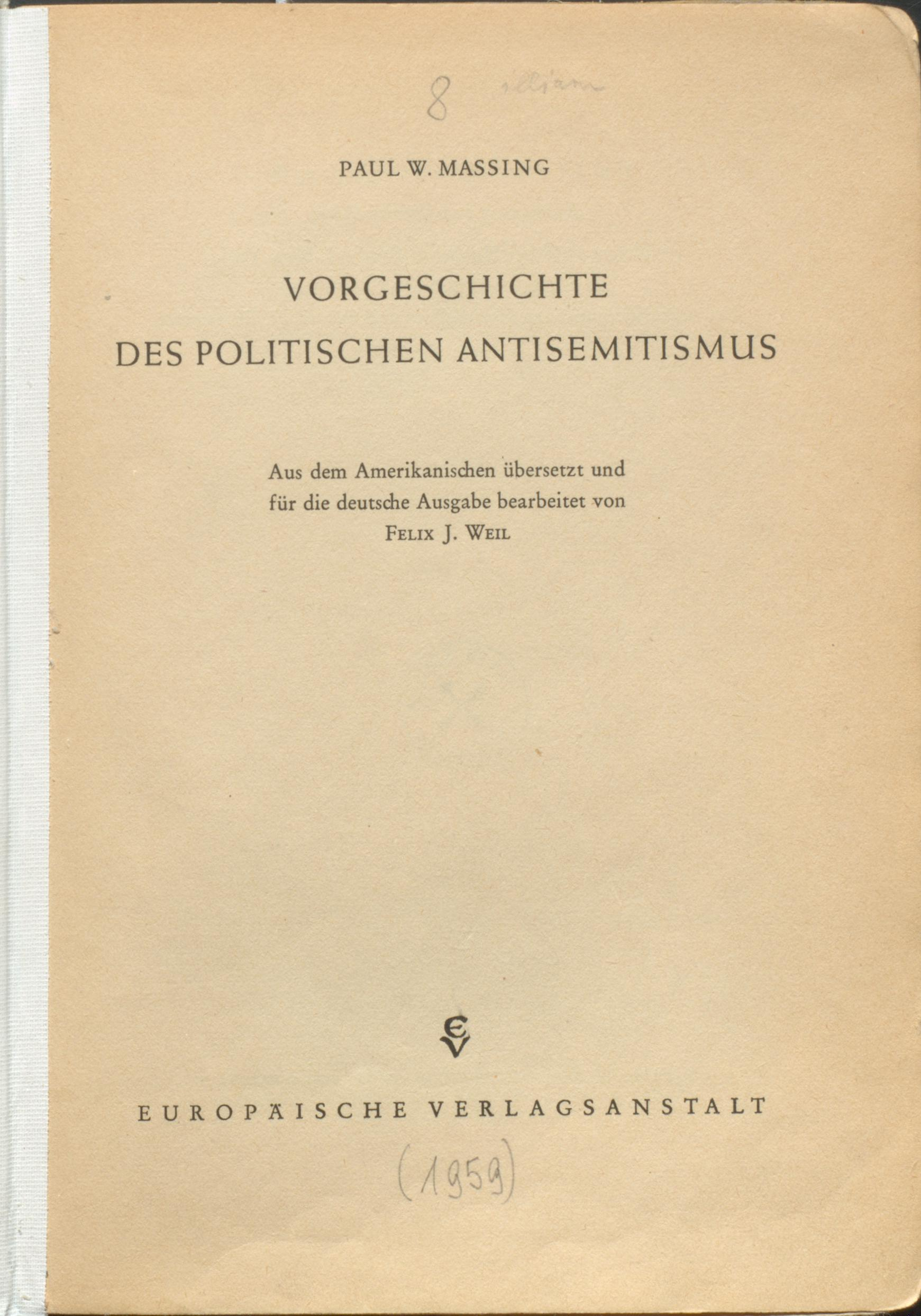 Paul Wilhelm Massing Antisemitismus 1959 Titel